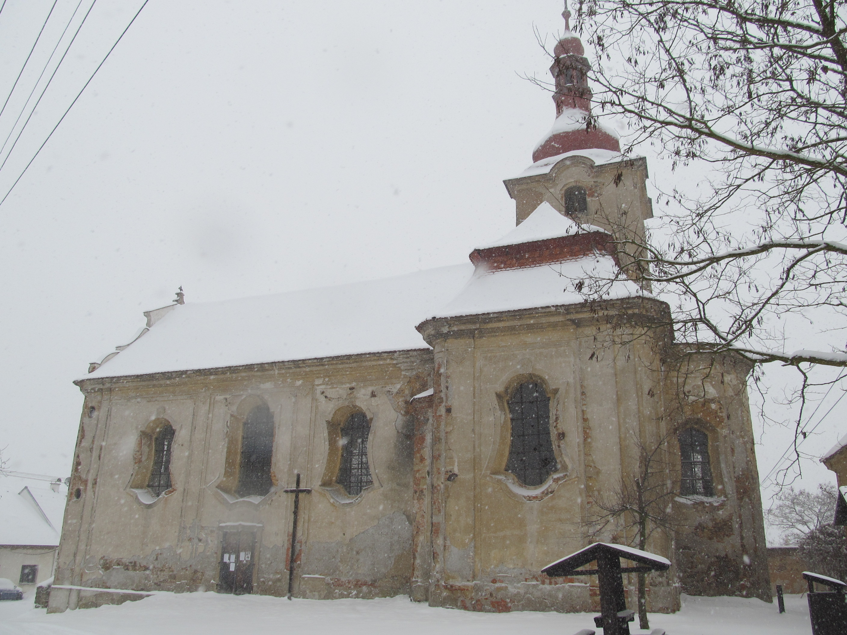 Jezná - kostel Nejsvětější Trojice